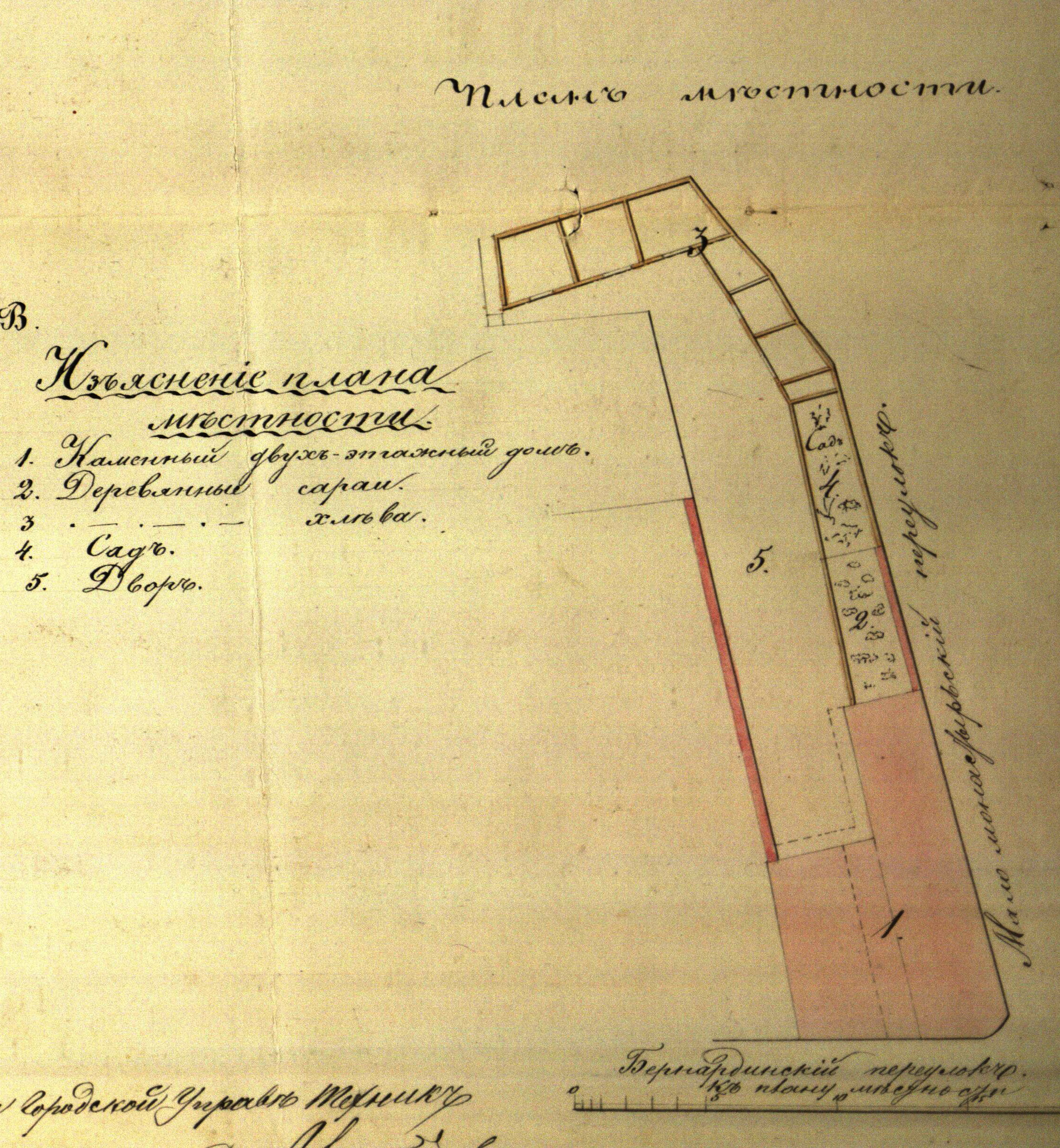 Беларуская (тарашкевіца): Менск (Miensk), рог завулку Музычнага (zavułak Muzyčny) і вуліцы Малой Бэрнардынскай (vulica Małaja Bernardynskaja)